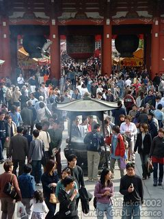 Description de l'image : temple d'Asakusa mai 2002 Source : Aoineko Statut : GFDL